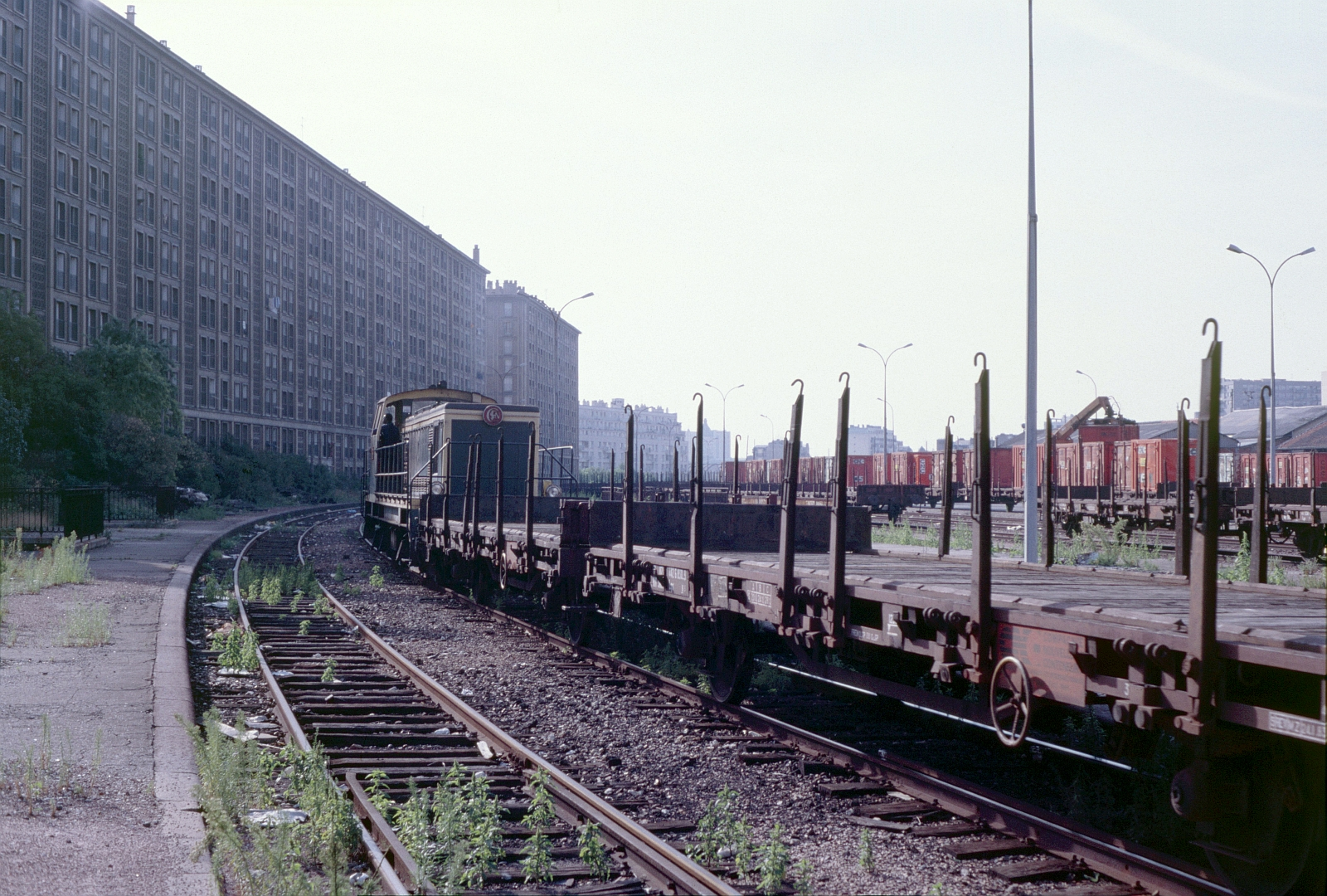 Un train de marchandises arrive en gare de Reuilly dans le 12e arrondissement de Paris le 25 septembre 1985.